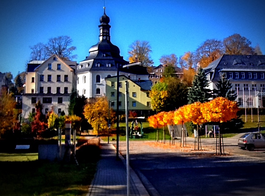 Marktplatz Klingenthal mit Rundkirche und Rathaus im Herbst